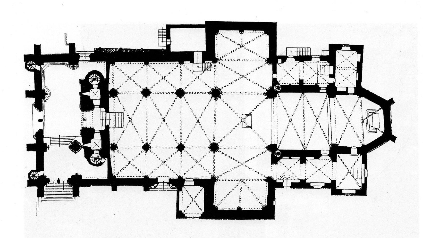 Der Grundriss des Wetzlarer Doms (Zustand 1989)